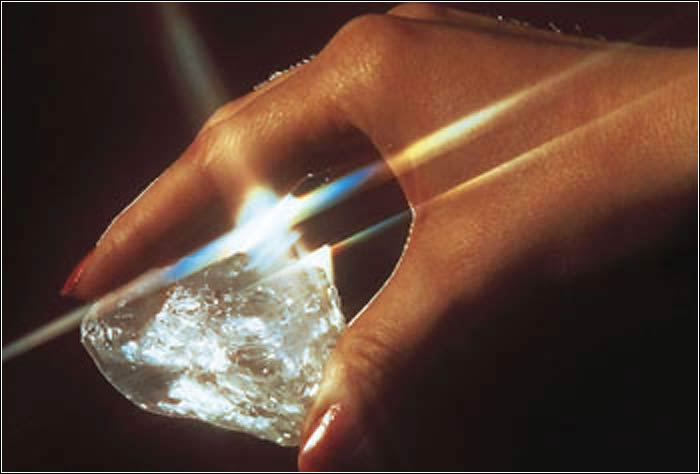 塞拉里昂之星：1972年2月14日发现于西非塞拉里昂的科诺（Kono）地区河流冲积砂矿中，重量为968.90克拉，晶形不完整，呈鸡蛋状，无色透明，属优质宝石级金刚石。经过精心设计。“塞拉里昂之星”金刚石被切割、加工和琢磨成17块钻石，分别被命名为Star of sierra Leone-1 -Star of Sierra Leone- 17 ，总重量为238.48克拉。